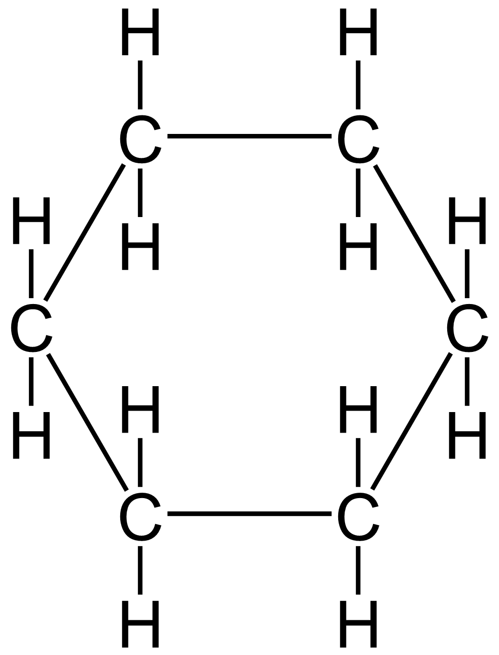 Strukturformel des Cyclohexan